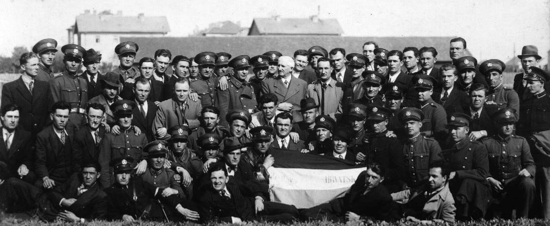 dolazak redarstvenih snaga novouspostavljene hrvatske države iz Splita u Zagreb, kao ispomoć. Prve snage Hrvatskog redarstva, 7. svibnja. 1941., Zagreb-Paromlin